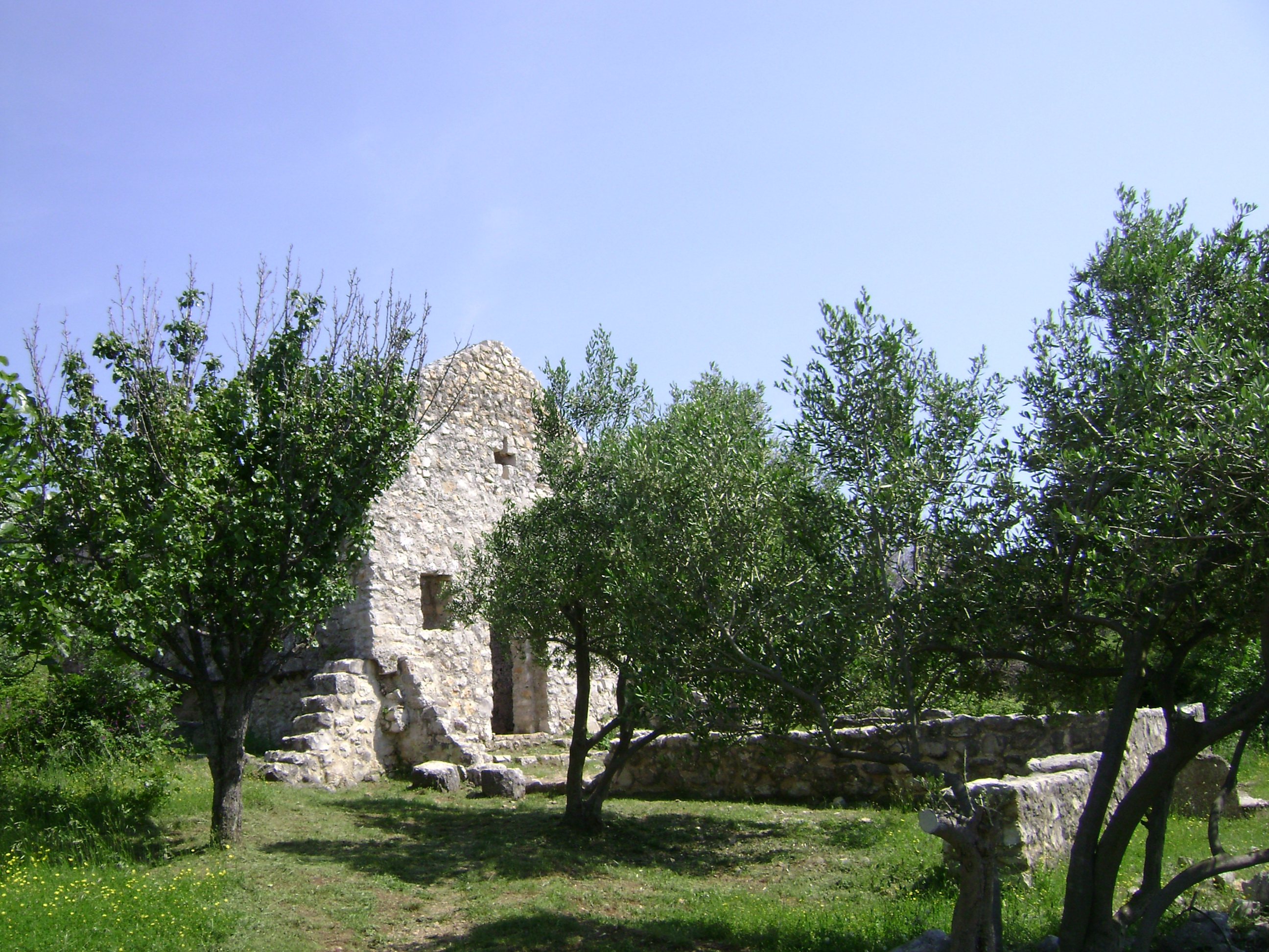 ruine crkvice Sv.Jeronima u uvali Zala